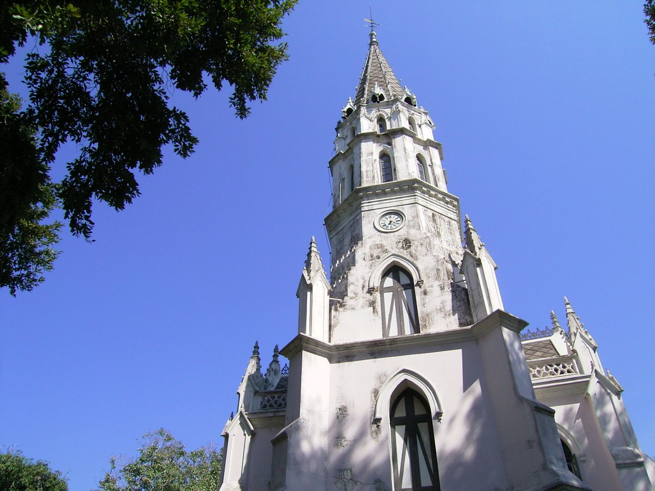 พระอุโบสถทรงโกธิก วัดนิเวศธรรมประวัติราชวรวิหาร สัญญาอนุญาต The present photo is taken or owned by Thanyakij. The camera used was: Ricoh Caplio GX. หมวดหมู่:วัดนิเวศธรรมประวัติราชวรวิหาร หมวดหมู่:ภาพสถานที่ ในจังหวัดพระนครศรีอยุธยา